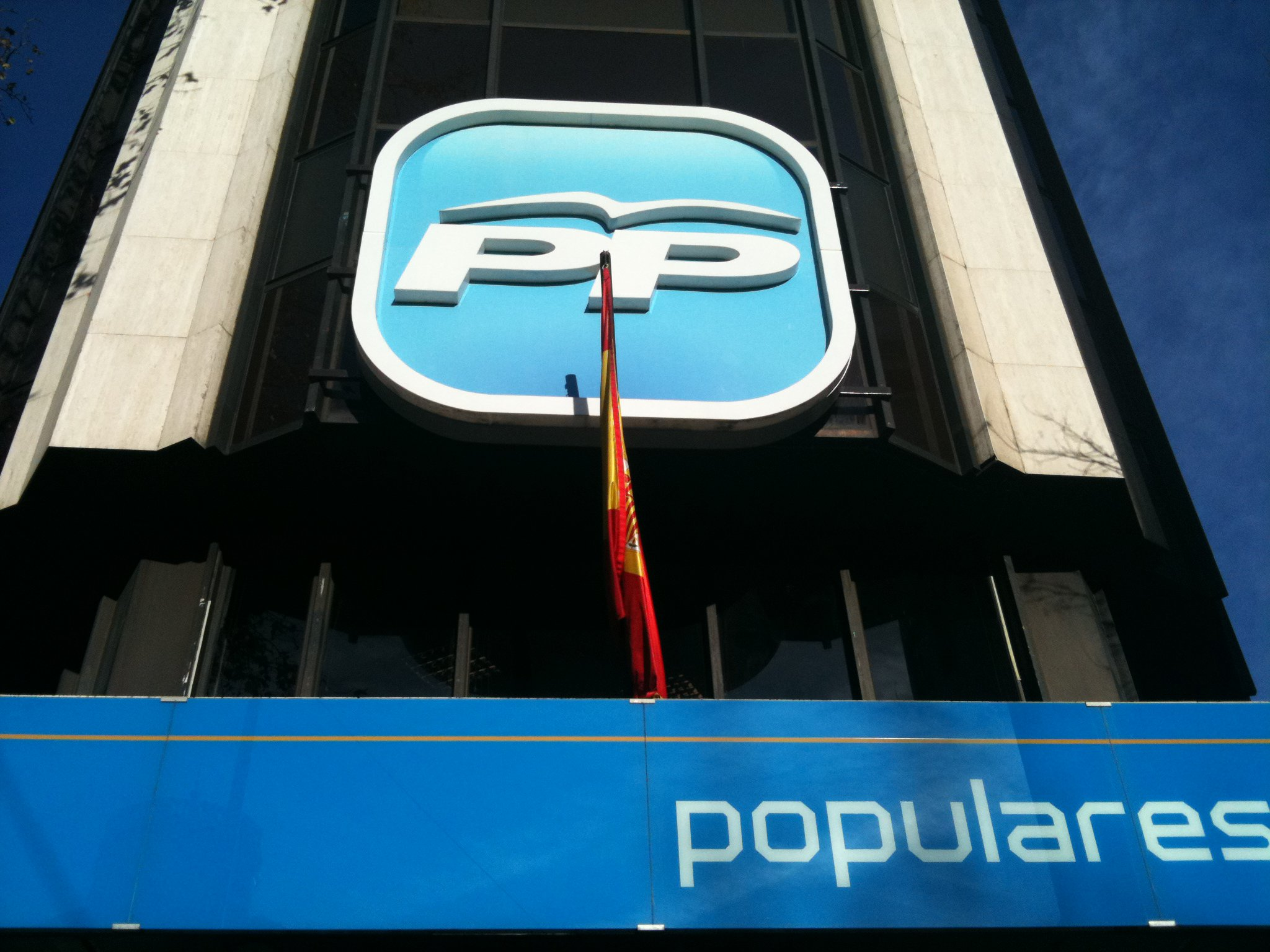 Sede nacional del Partido Popular, situada en la C/ Génova (Madrid, España)